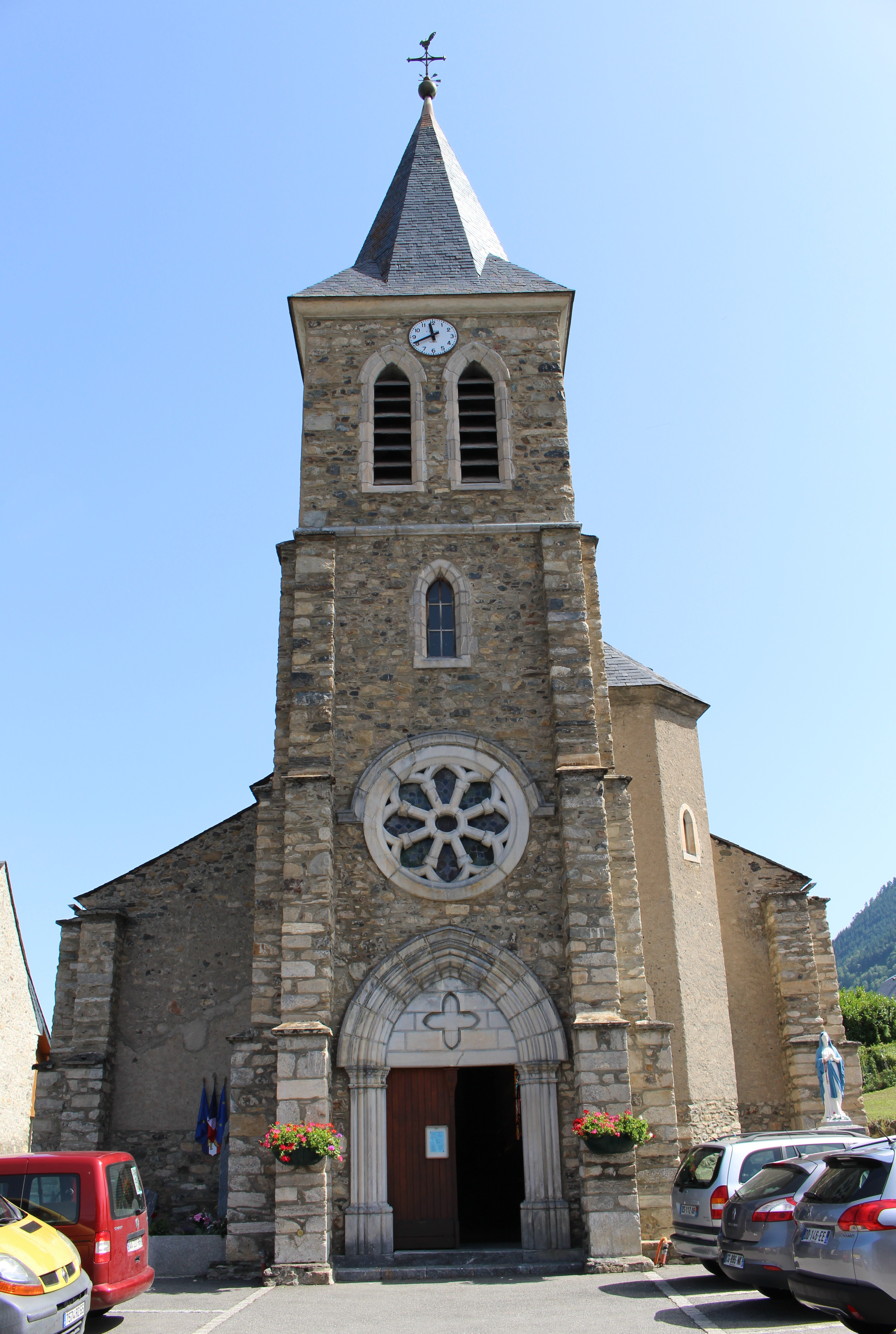 Église Saint-Laurent de Sailhan (Hautes-Pyrénées)